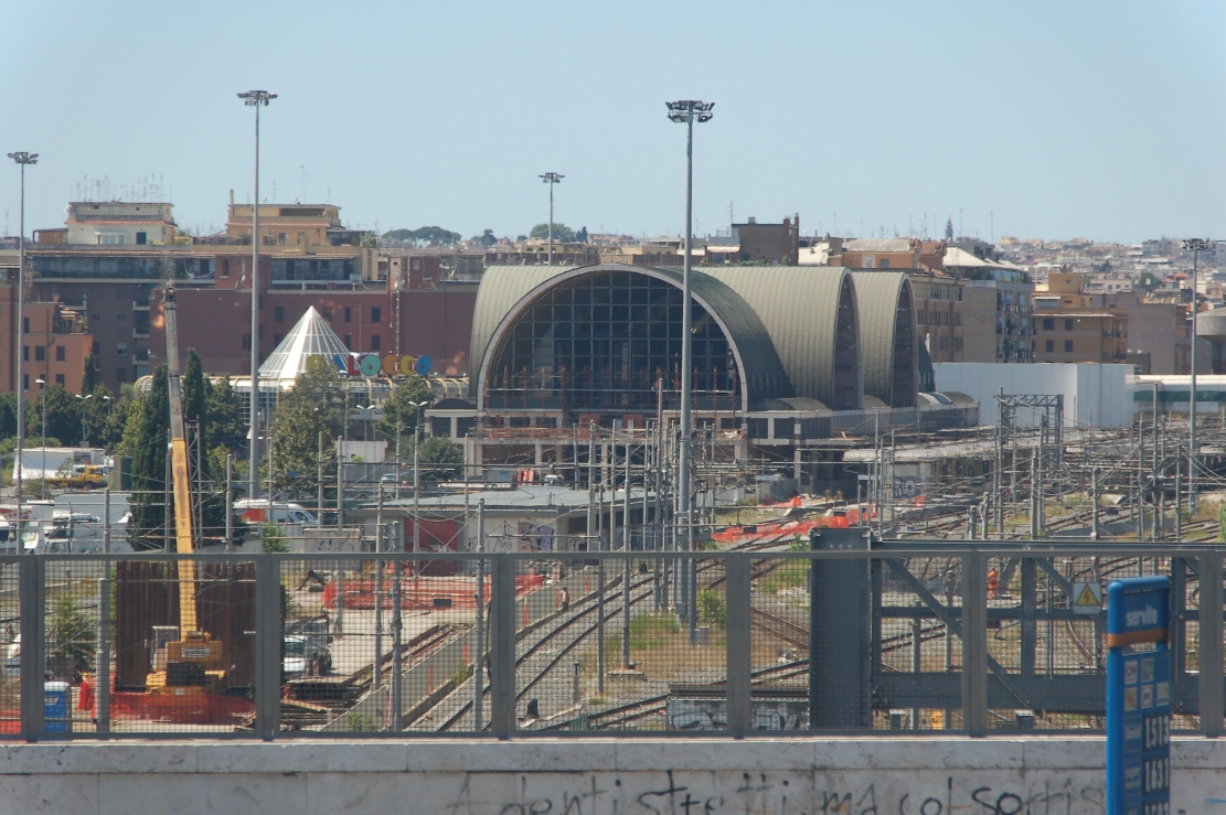 Roma, stazione Ostiense